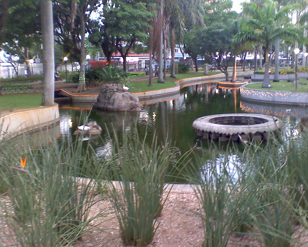 Foto do Parque Moscoso realizada em Dezembro de 2007 com Decoração de Natal